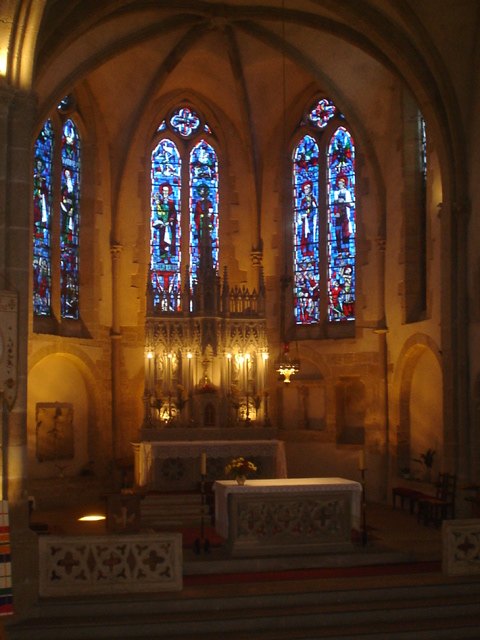 Vu du choeur de la Collégiale Saint-Etienne